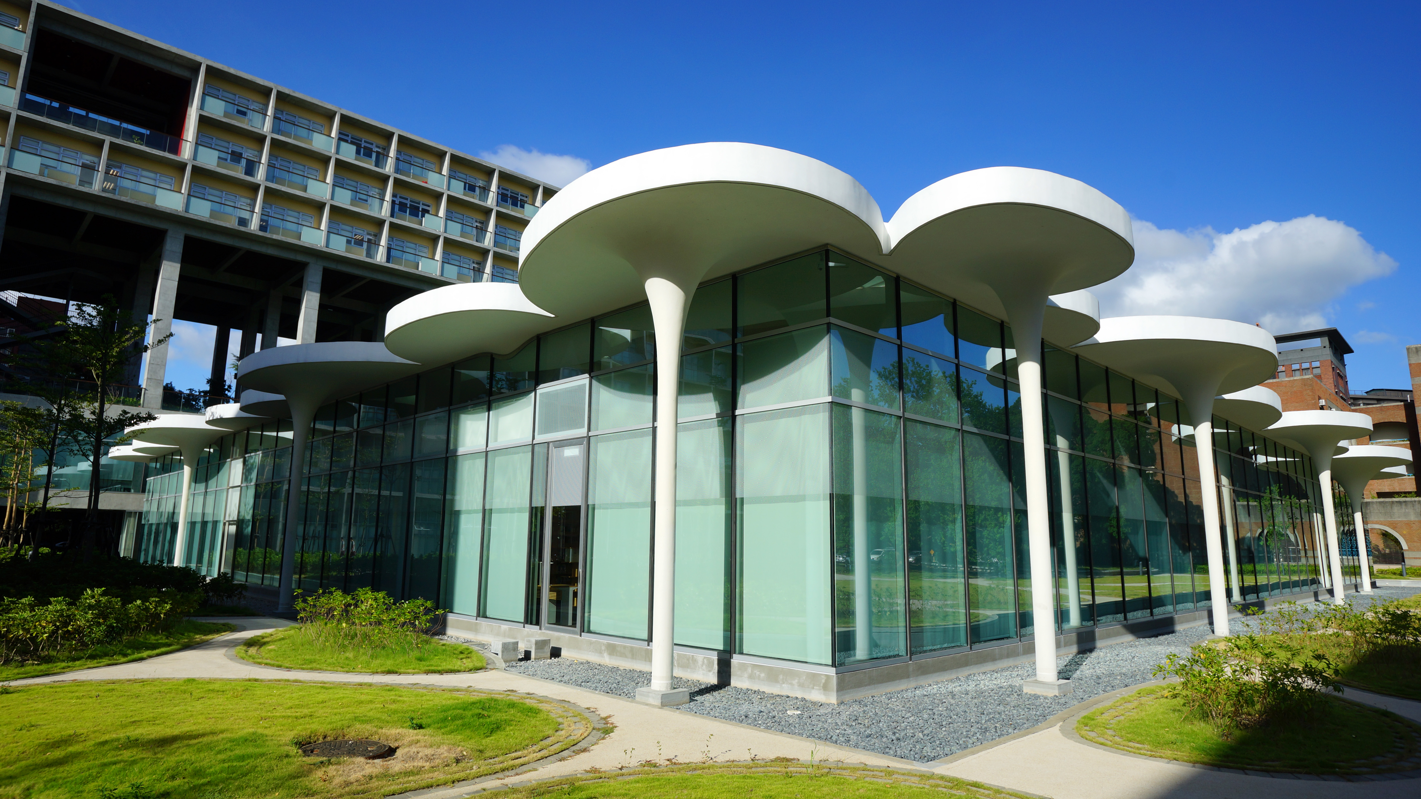 國立臺灣大學社會科學院辜振甫先生紀念圖書館。